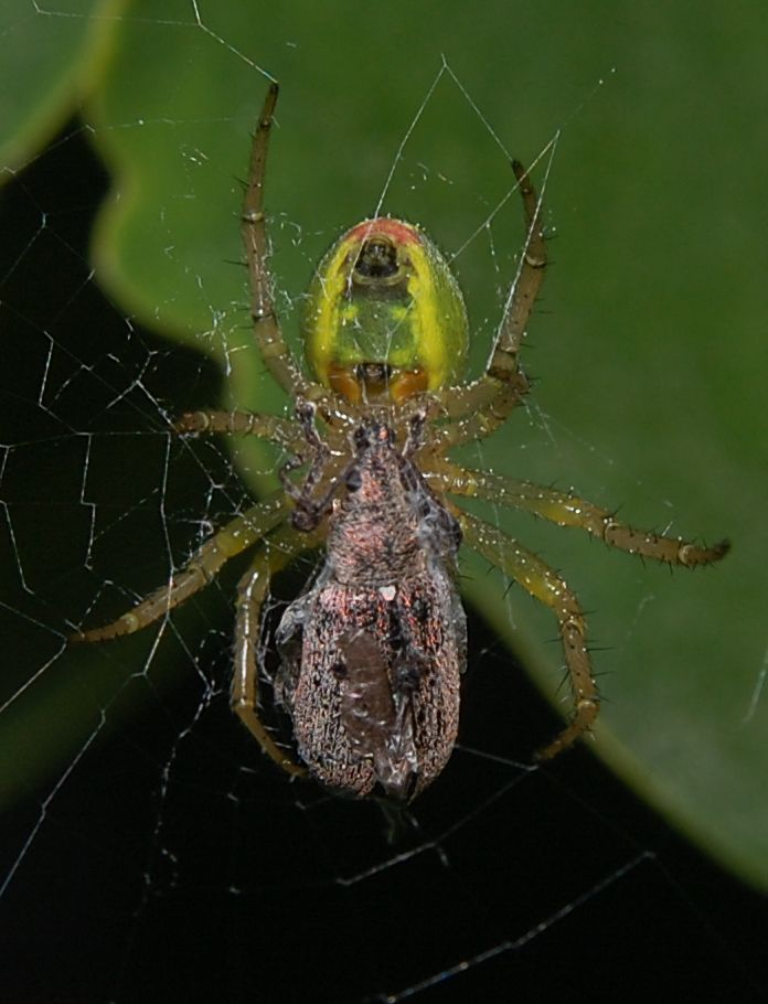 Araniella opisthographa, female im Netz mit Rüsselkäfer. Forst Jungfernheide, Berlin, Deutschland. det. (genitalmorphologisch) K.-H. Kielhorn, Berlin